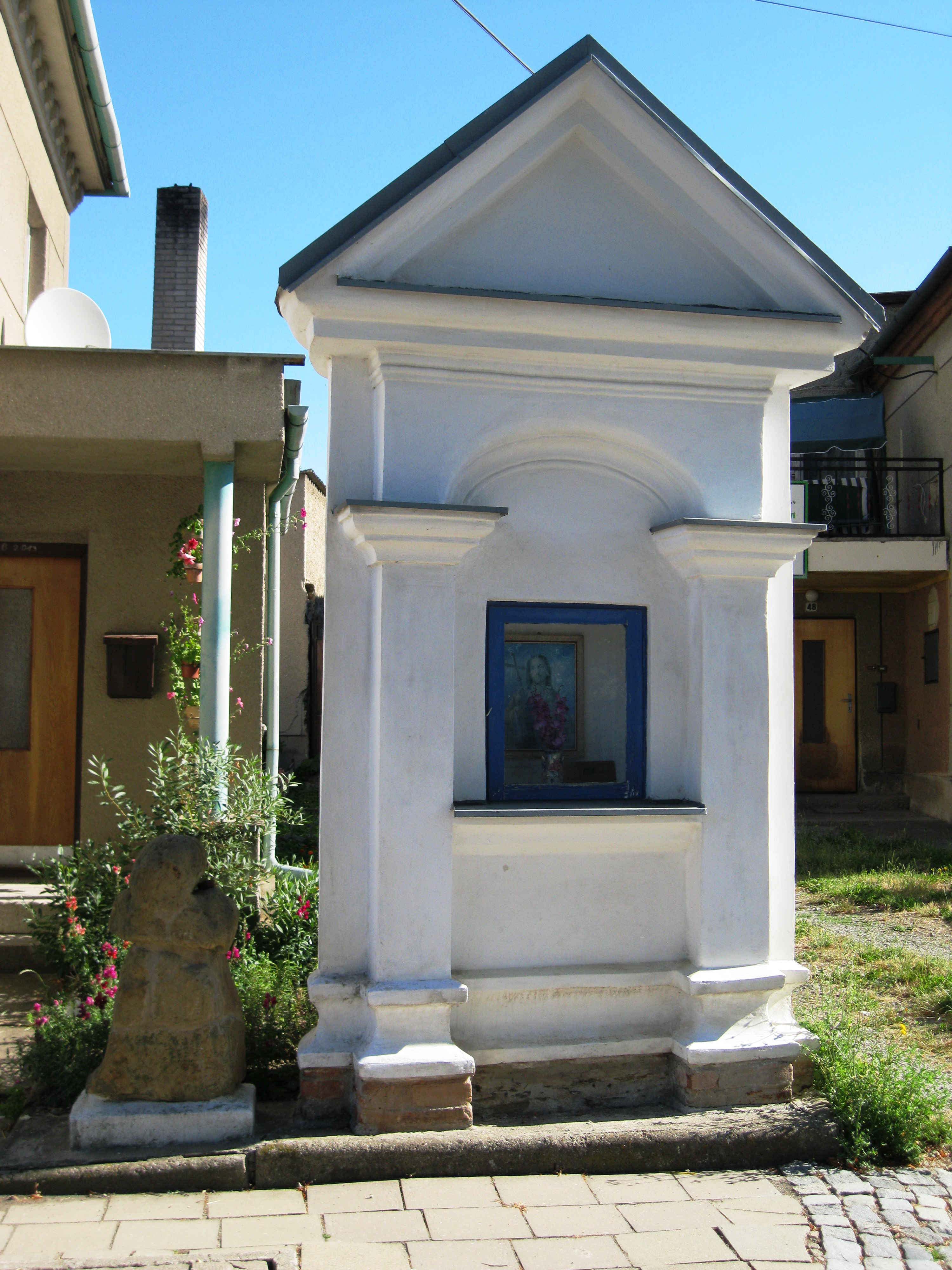 Výklenková kaplička se smírčím křížem (Bílsko), na východním konci obce, mezi čp. 1 a čp. 48, Bílsko